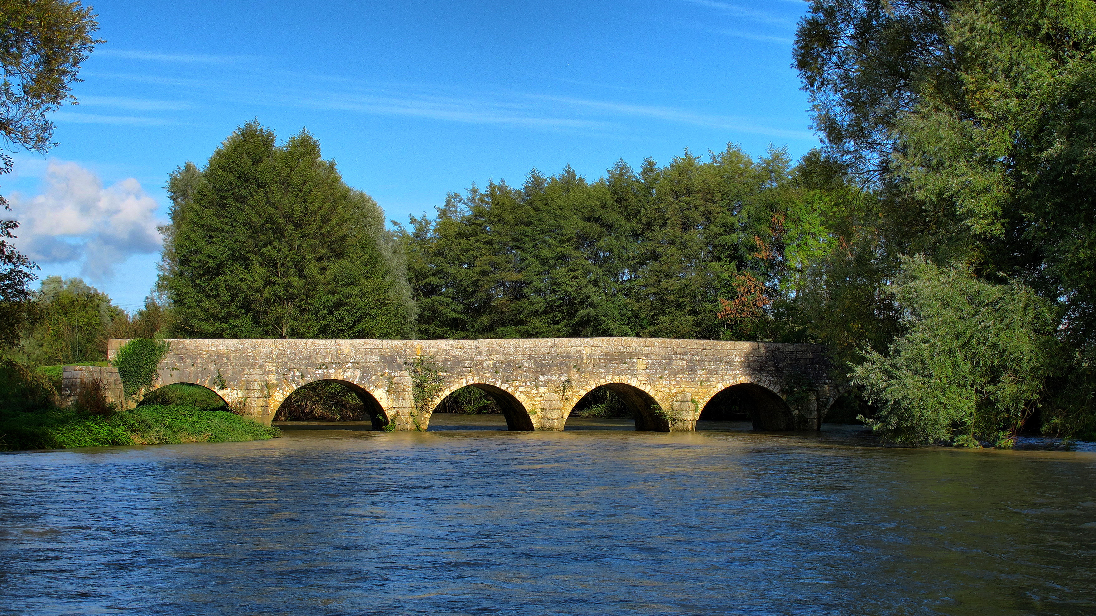 Inscrit aux monuments historiques sous le numéro PA00102234